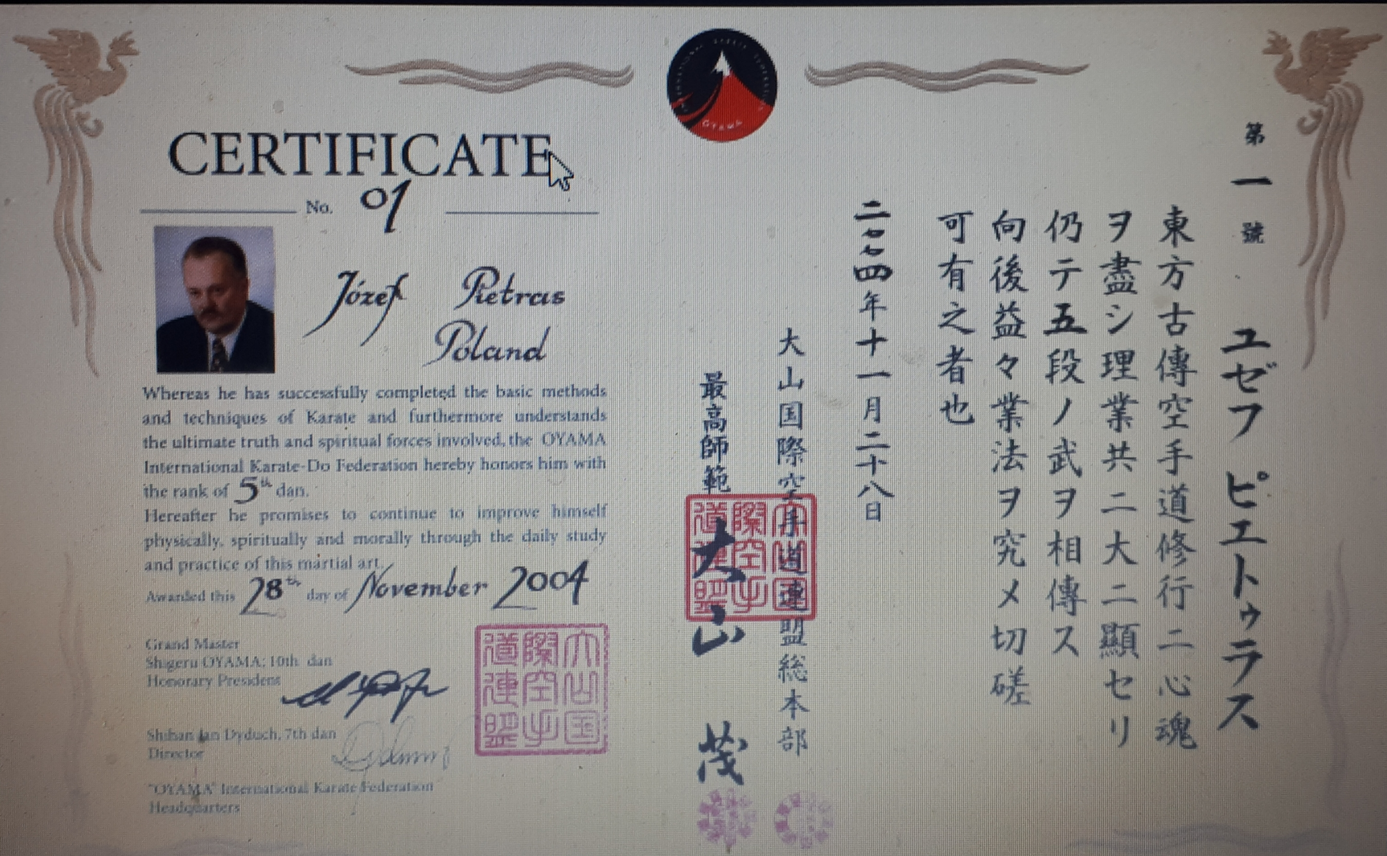 Japoński certyfikat